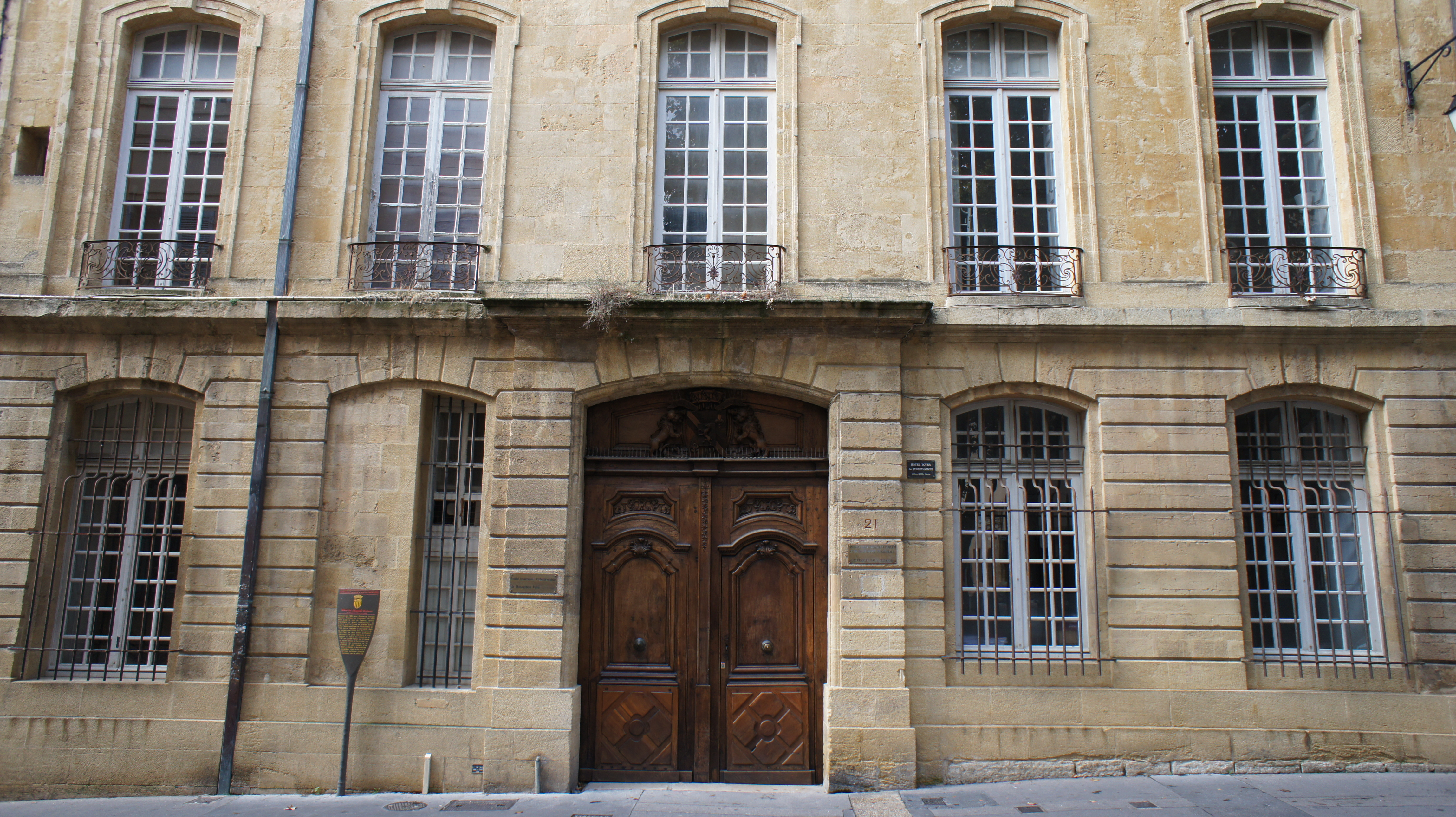 Hôtel Boyer de Fonscolombe dit aussi de Saporta ou de Vitrolles, 21 rue Gaston-de-Saporta, Aix-en-Provence (France). Construit vers 1650, pour Charles de Grimaldi-Régusse, Président au Parlement, cet hôtel porte aussi le nom de Saporta, dernier propriétaire et grand collectionneur de fossiles, que l'on trouve en quantité autour d'Aix. Il passe aux Boyer de Fonscolombe en 1743, qui en réduisent la cour-jardin dans un partage avec l'hôtel des Thomassin de Saint-Paul, les deux hôtels partageant désormais une grille intérieure et une fontaine. La façade est redessinée en 1757 par Laurent Vallon, qui lui donne un aspect simple et horizontal, par l'absence de mascarons et de pilastres, et par l'emploi d'un décor à refends et de corniches soulignées. L'arc de la porte à carrosse, surbaissé (presque horizontal), sert le même but.